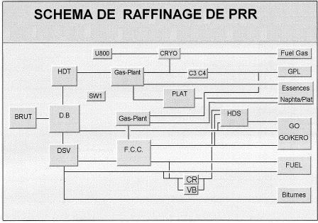 Schéma de raffinage de la raffinerie Petroplus Raffinage Reichstett Légende : DB : Distillation atmosphérique DSV : Distillation sous vide CR : Craquage thermique VB : Viscoréduction HDT : Hydrotraitement de tête (hydrogénation) CRYO : Cryogénisation C3 C4 : Propane butane PLAT : Reformage catalytique HDS : Hydrodésulfuration F.C.C. : Craquage catalytique U800 : Traitement des coupes de tête (fuel gas). SW1 : Traitement des eaux à usage interne PE : Production électrique GO : Gasoil KERO : Kérosène